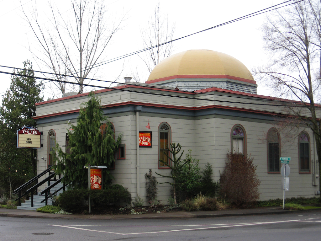 Tour de McMenamins 2008 - St Johns Pub